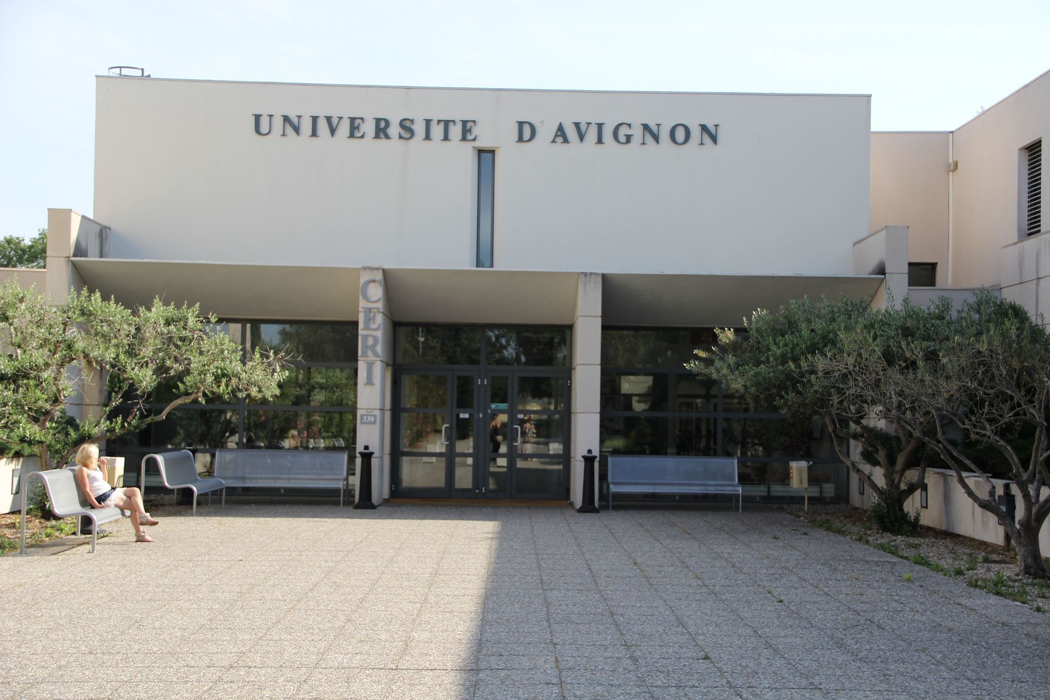 Université d'Avignon le CERI Centre d'enseignement et de recherche en informatique